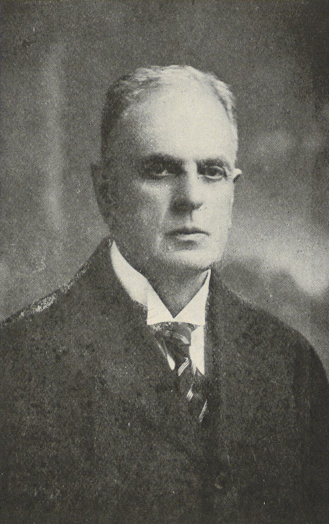 Tomás Guevara Silva (Curicó, Región del Maule; 1866-1938) fue un historiador, antropólogo y etnólogo chileno, estudioso del pueblo mapuche y ex combatiente de la Guerra del Pacífico.